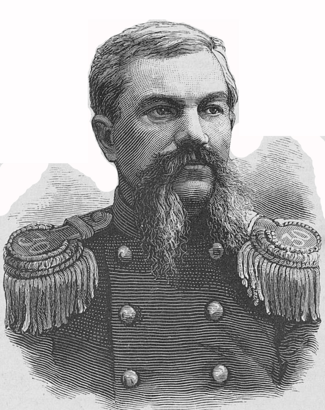 Полковник Гудима Василий Васильевич, 1877 год